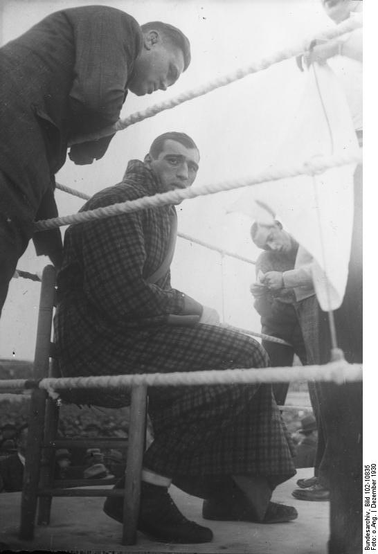 Der grosse Boxkampf des italienischen Riesen Carnera gegen den Spanier Paolino! Der italienische Riese Carnera kurz vor dem Kampf im Ring.